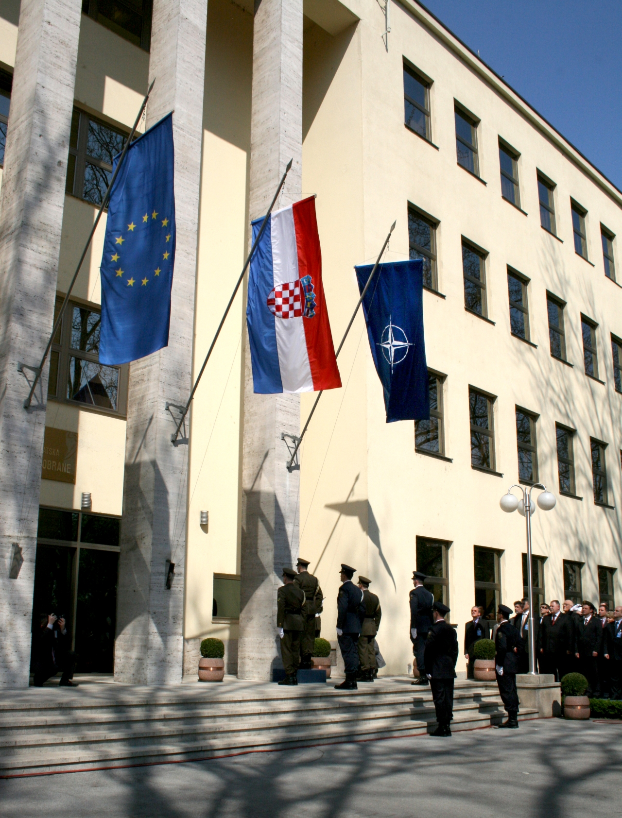 Svečanost podizanja NATO-ve zastave ispred zgrade MORH-a u Zagrebu.